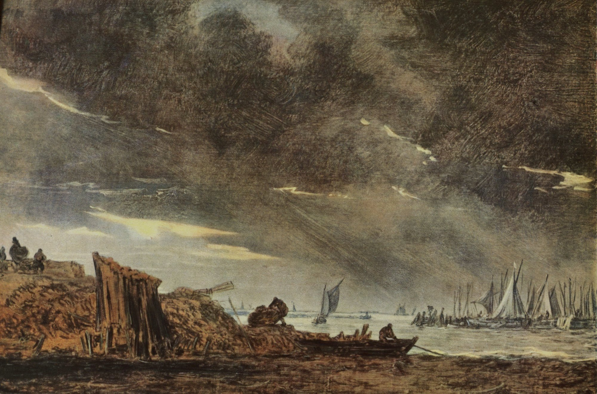 Za bouře